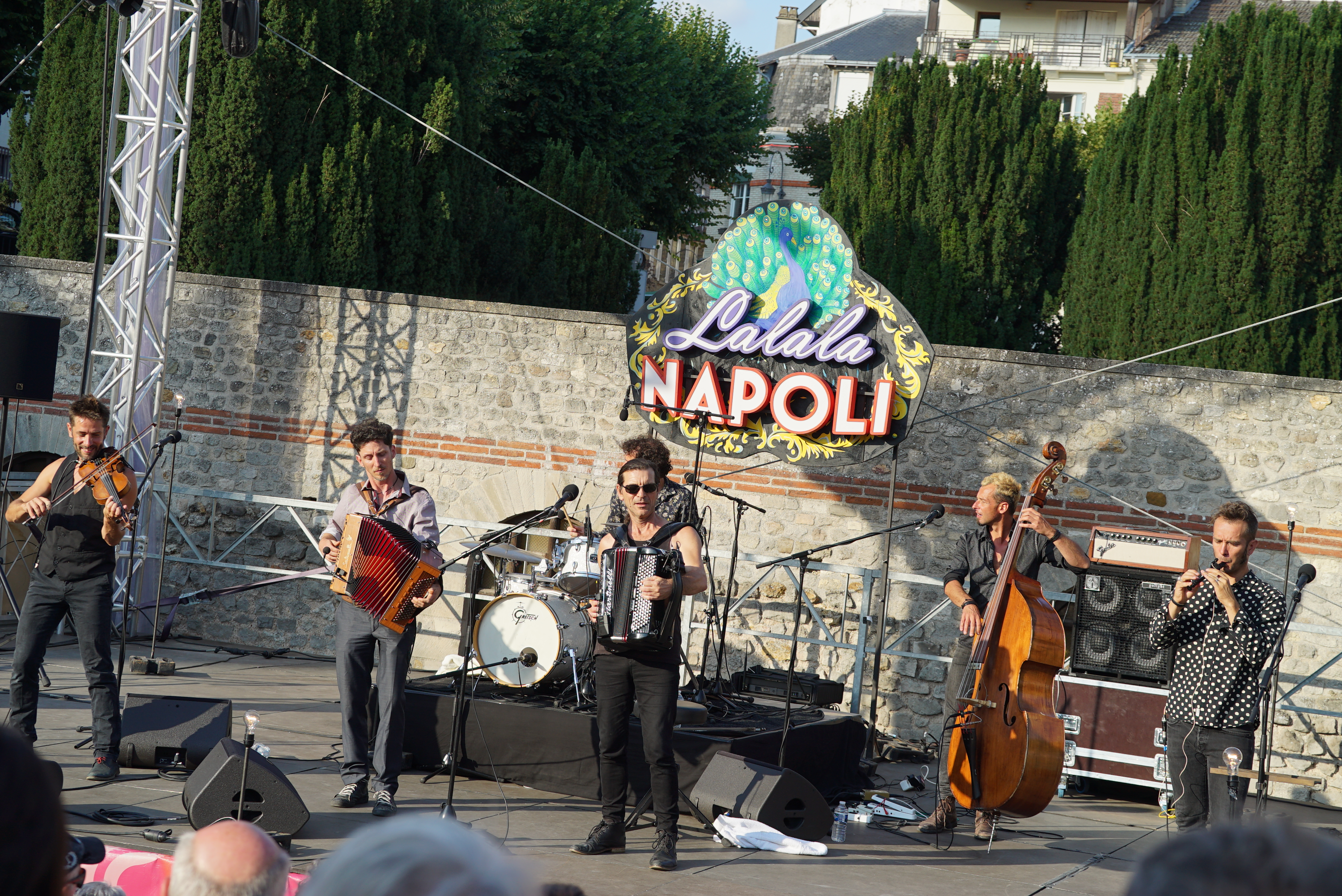 en concert au cryptoportique de Reims.